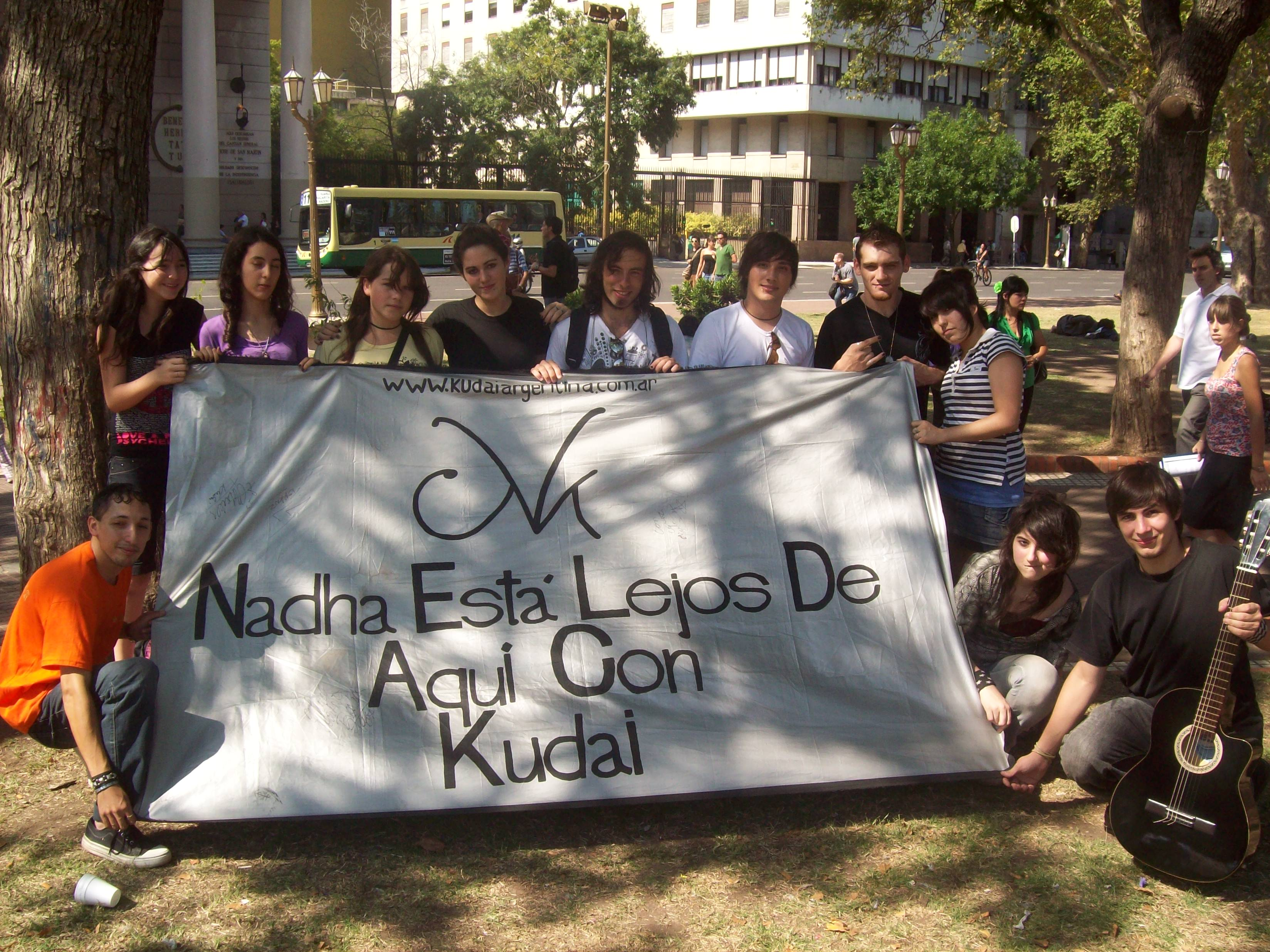 Fotografia tomada en la ciudad de Buenos Aires, Reunion del club de Fans Nadha Está Lejos De Aquí Con Kudai